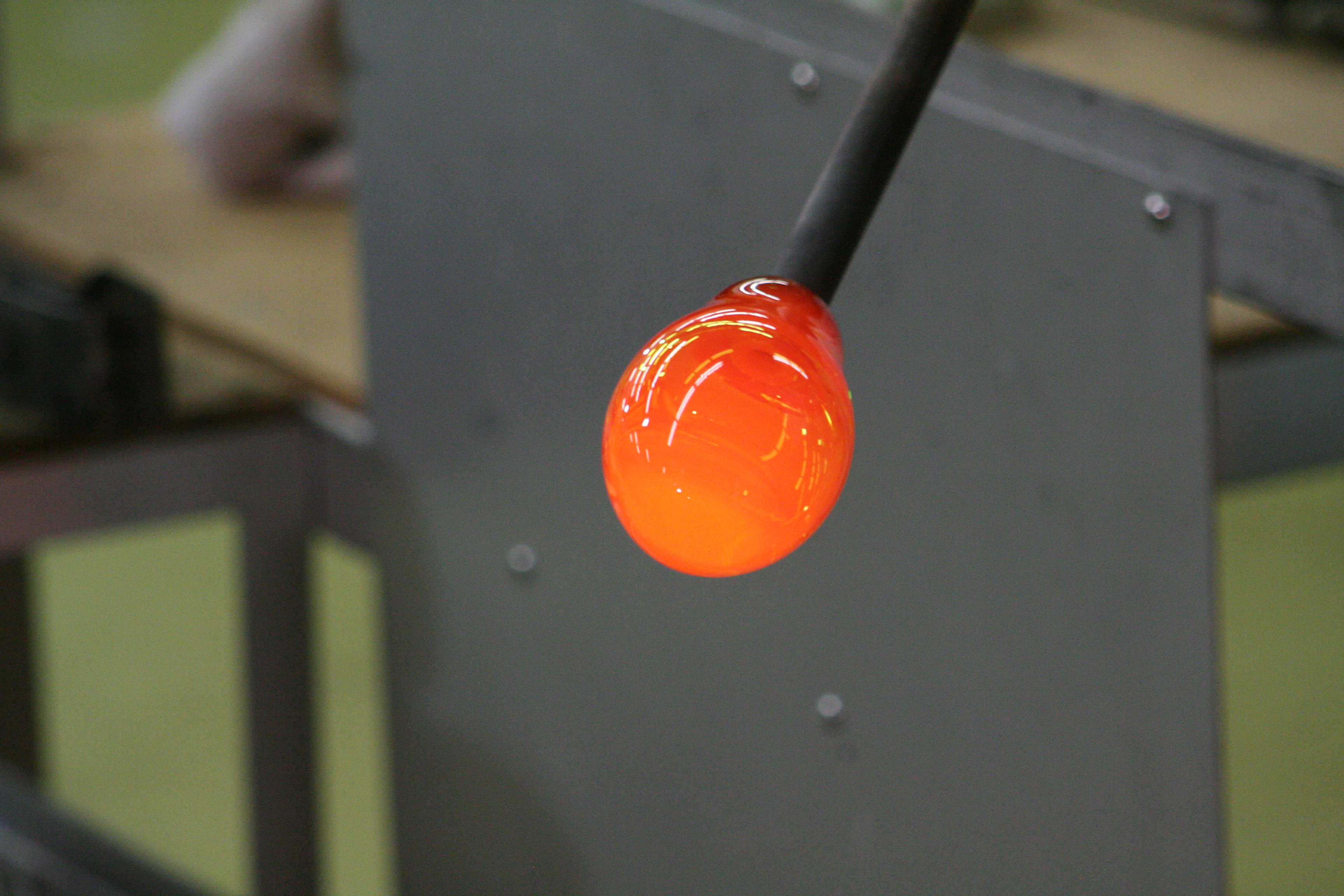 2009年9月29日から10月1日にかけて行なわれたNHK神戸のテレビ実況中継キャラバンによるテレビ収録の様子。キャラバンの司会者は今城和久と久保静。最終中継地である相生市内の相生ペーロン城にて撮影。 空洞になった棒の先から空気を送り込み膨らんでいくガラスの塊。